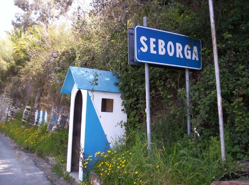 Seborga - antica frontiera